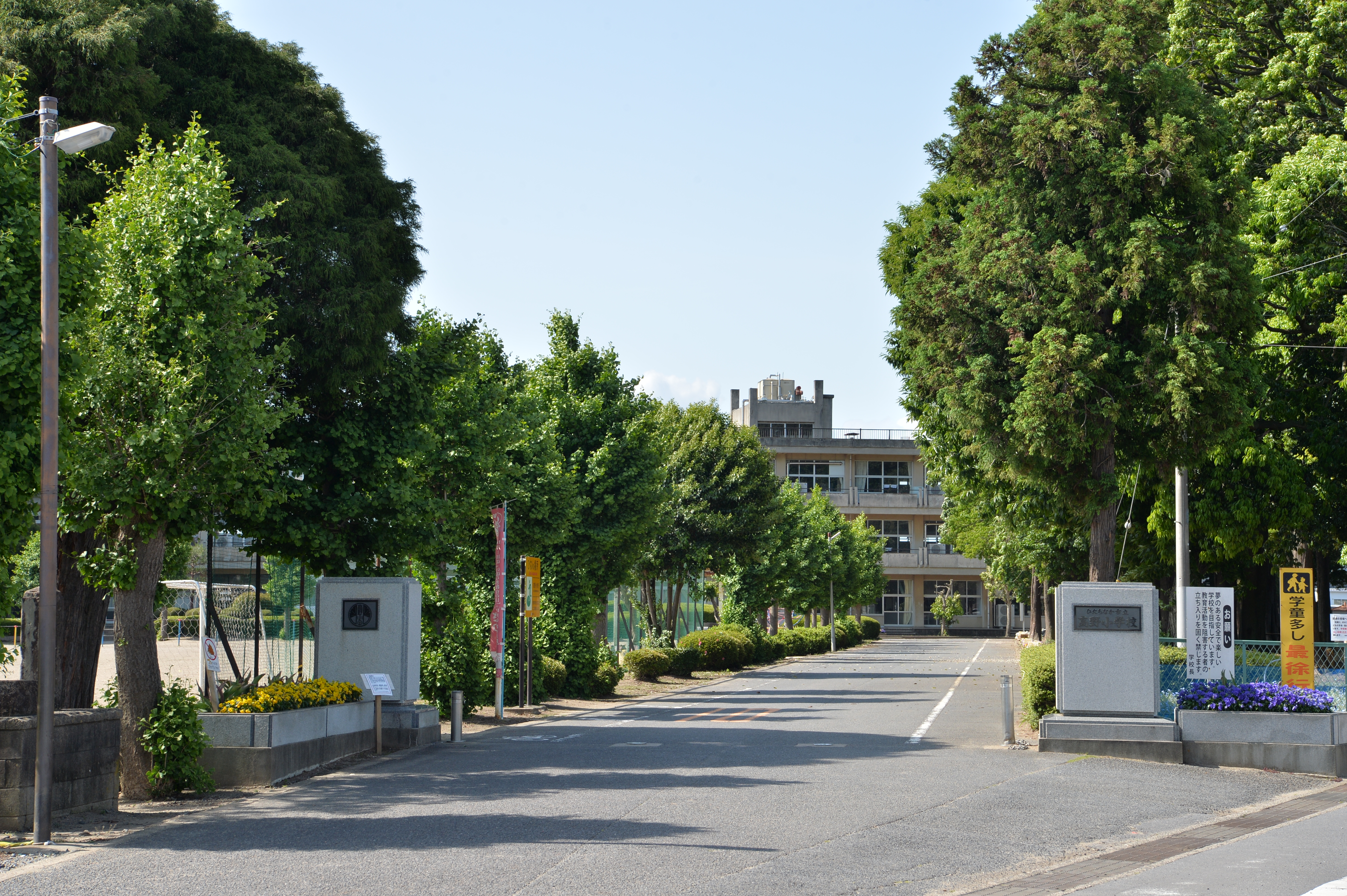 茨城県ひたちなか市高野に所在する、ひたちなか市立高野小学校の正門前